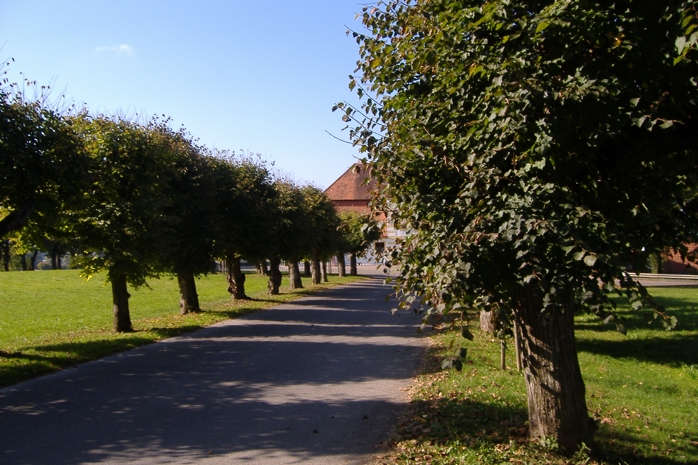 Bertoldsheim